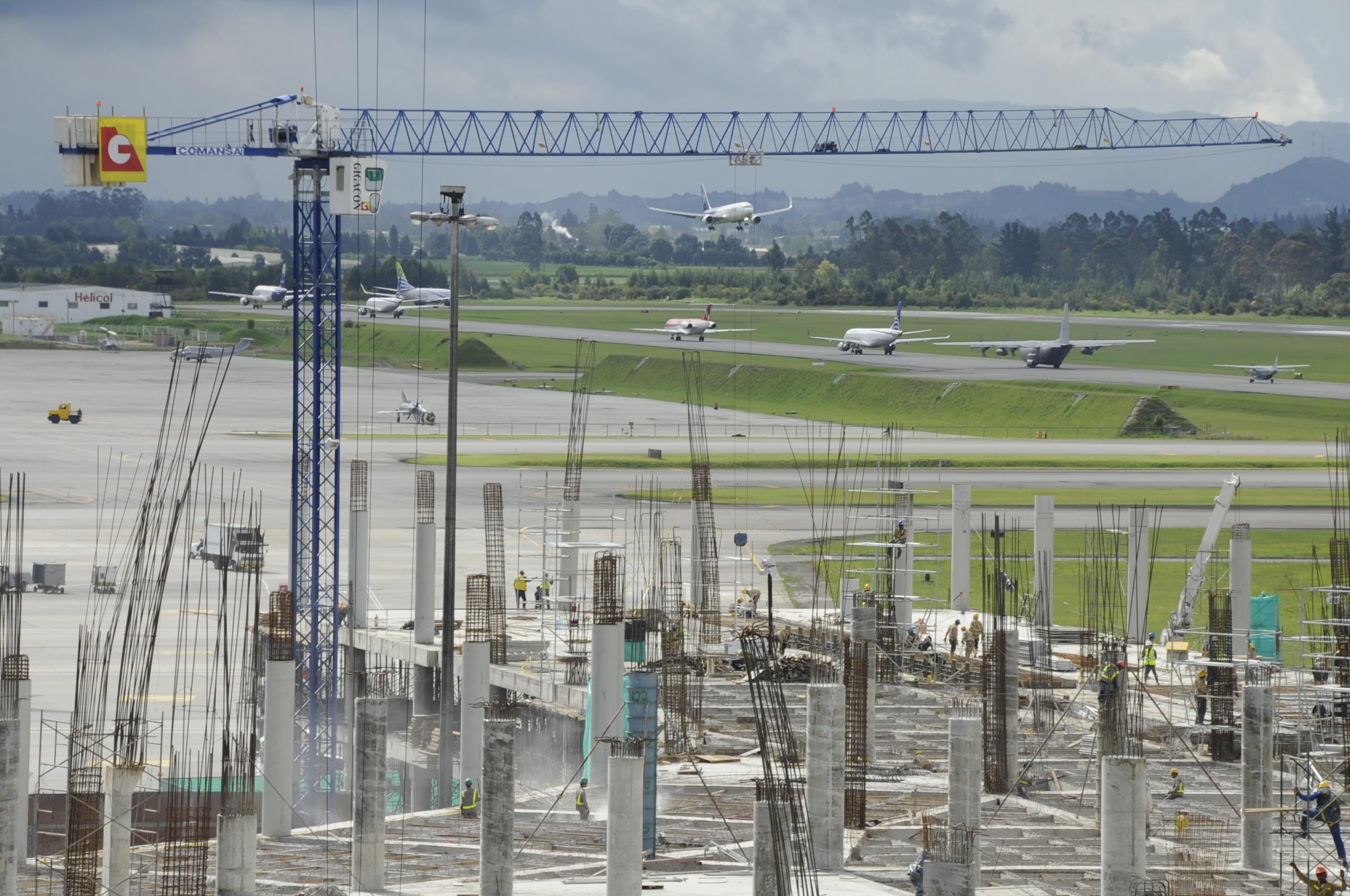 Vista general obras realizadas agosto 2013